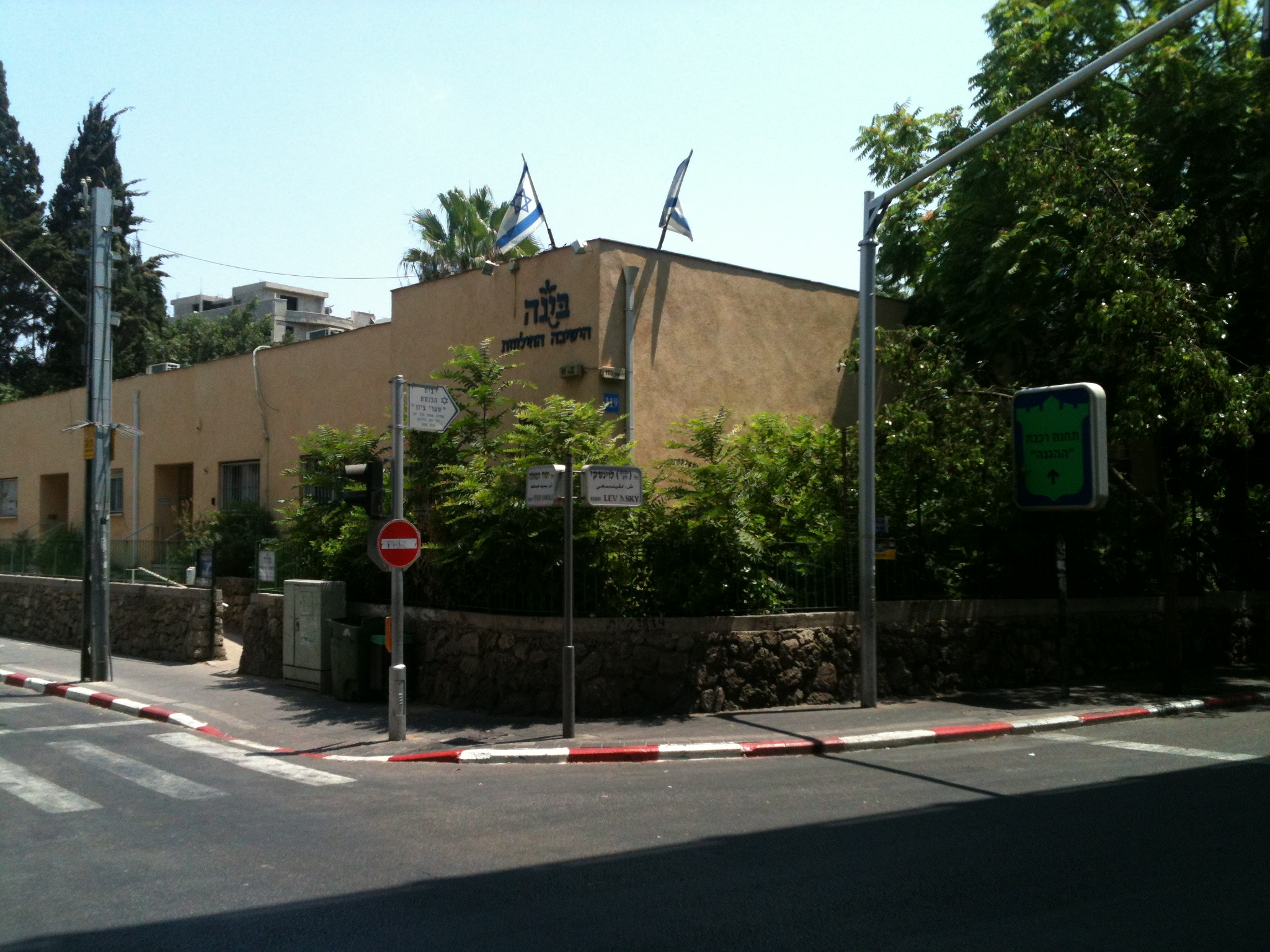 הישיבה החילונית בתל אביב